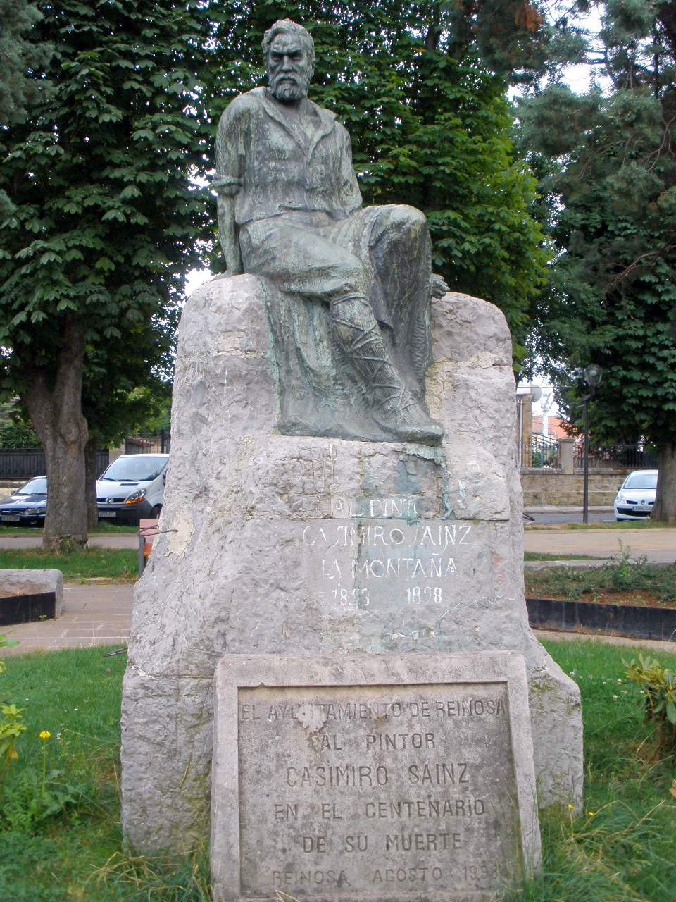 Monumento al pintor Casimiro Sainz (Reinosa, Cantabria)